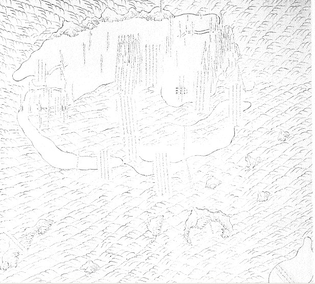 old Taiwan Map in 1680 台灣略圖